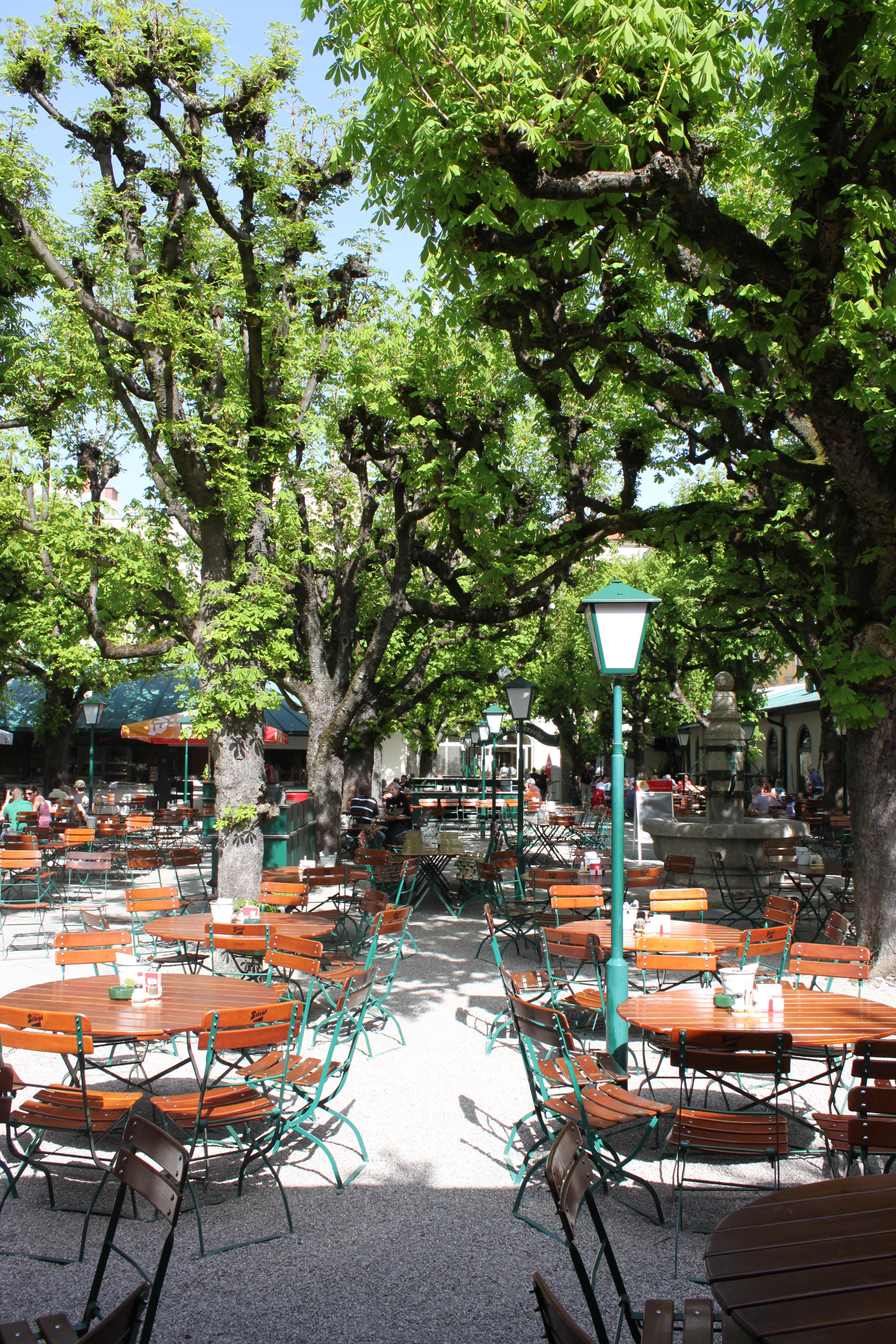 Klosterhof, Baumgartenberger Stiftshaus, ganz hinten, nähe Stöckl, Richtung Hauptgebäude, Hauptgebäude wegen der Bäume kaum sichtbar